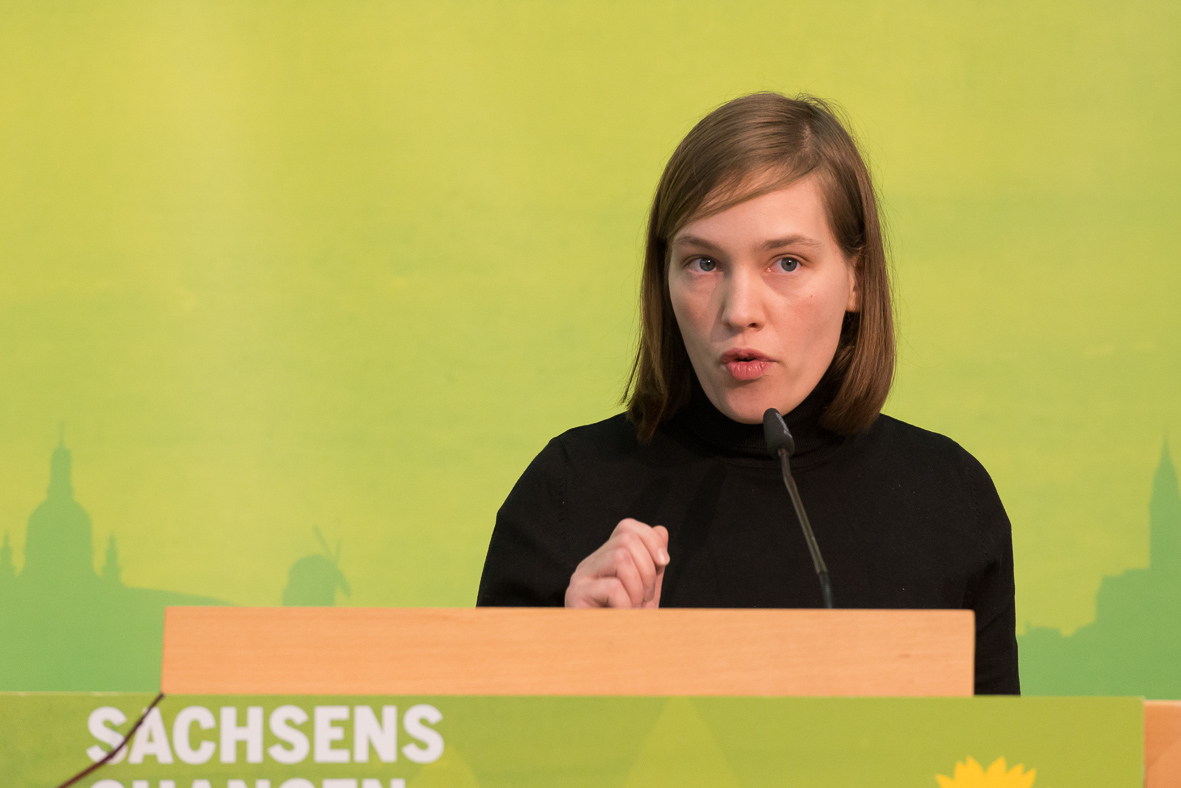 Christin Bahnert